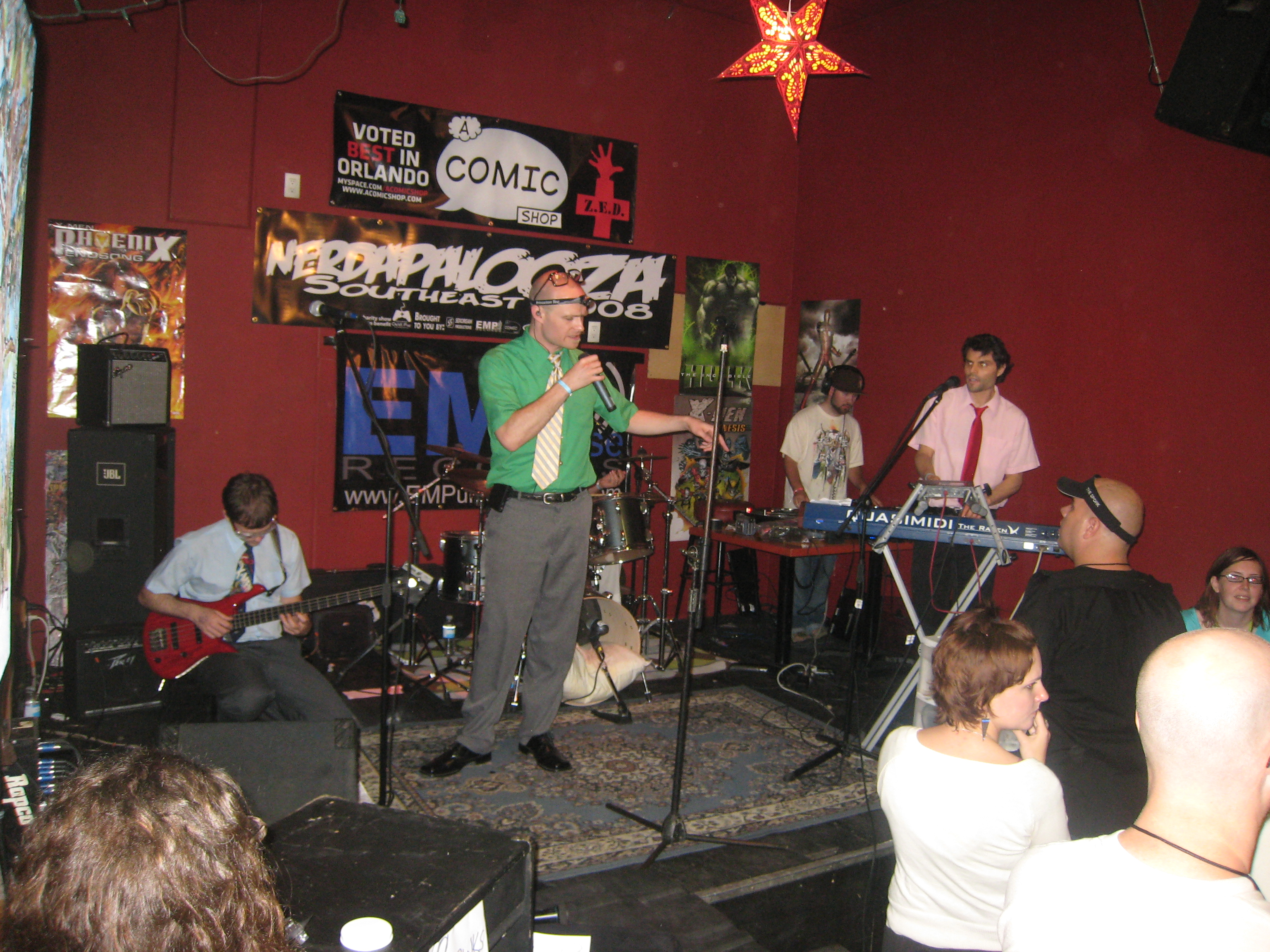 MC Frontalot at Nerdapalooza 2008.